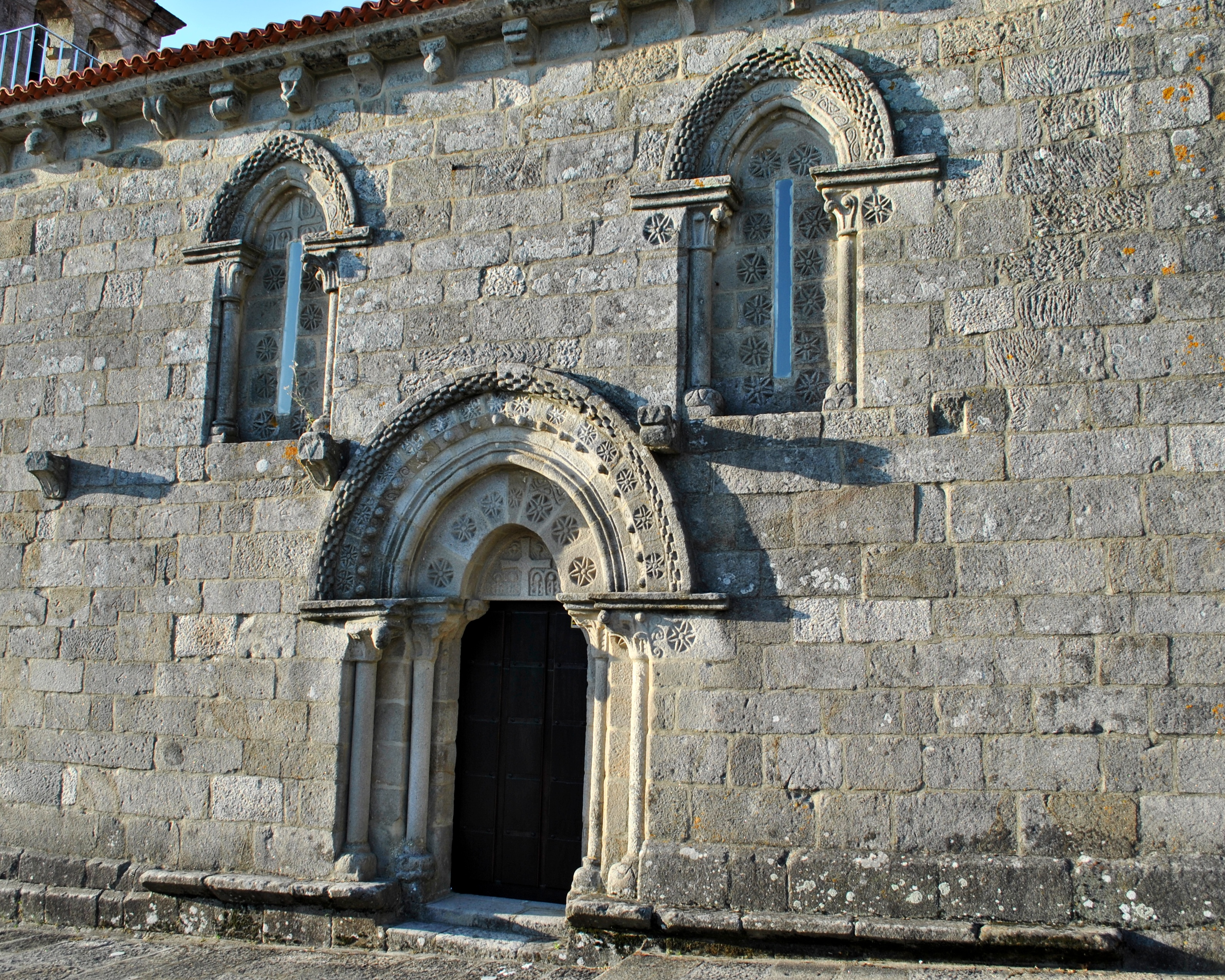 Vexa o título e as categorías.